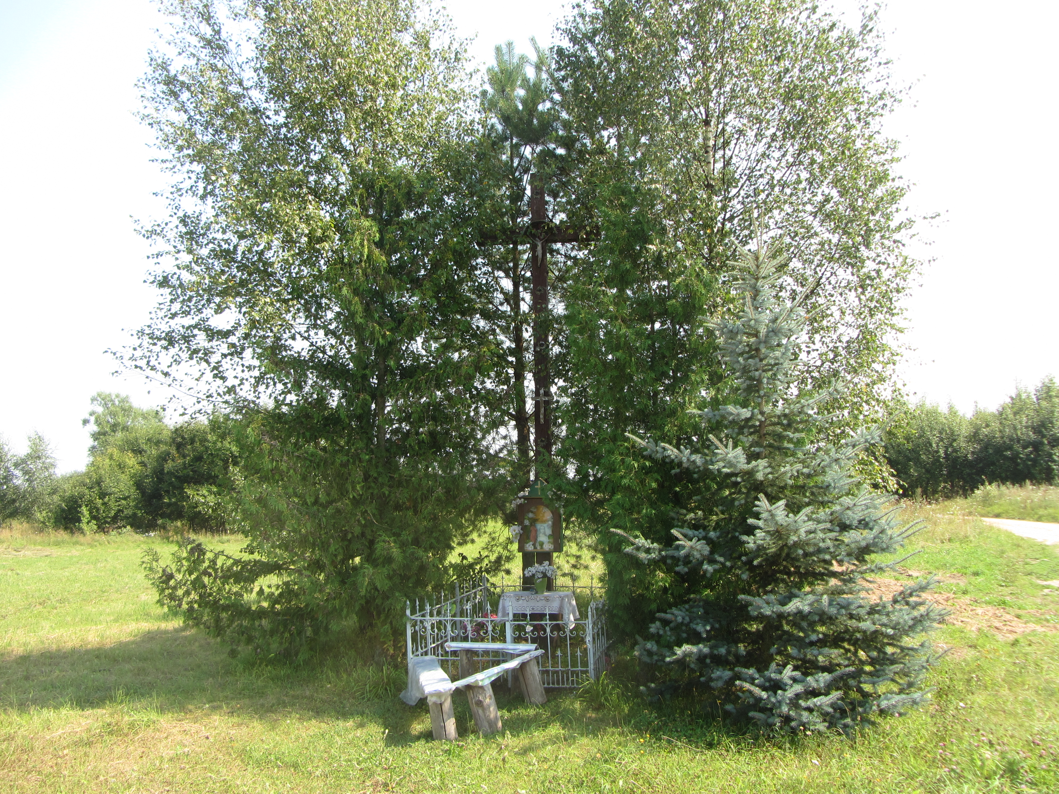 Nemėžio sen., Lithuania